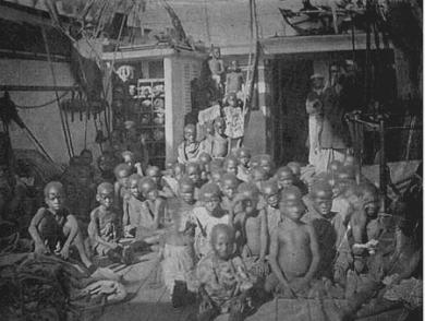 "Aboard an Arab slave ship intercepted by the Royal Navy, 1869." / fr. Jeunes enfants noirs captifs (futurs esclaves) rescapés par le HMS Daphne de la Royal Navy sur les côtes de l'Afrique de l'Est, 1868-69. Une des photos incluses dans le rapport de John Armstrong Challice, lieutenant dans la Royal Navy pour abolir l'esclavage à Zanzibar. Zanzibar n'a aboli l'esclavage qu'en 1897.